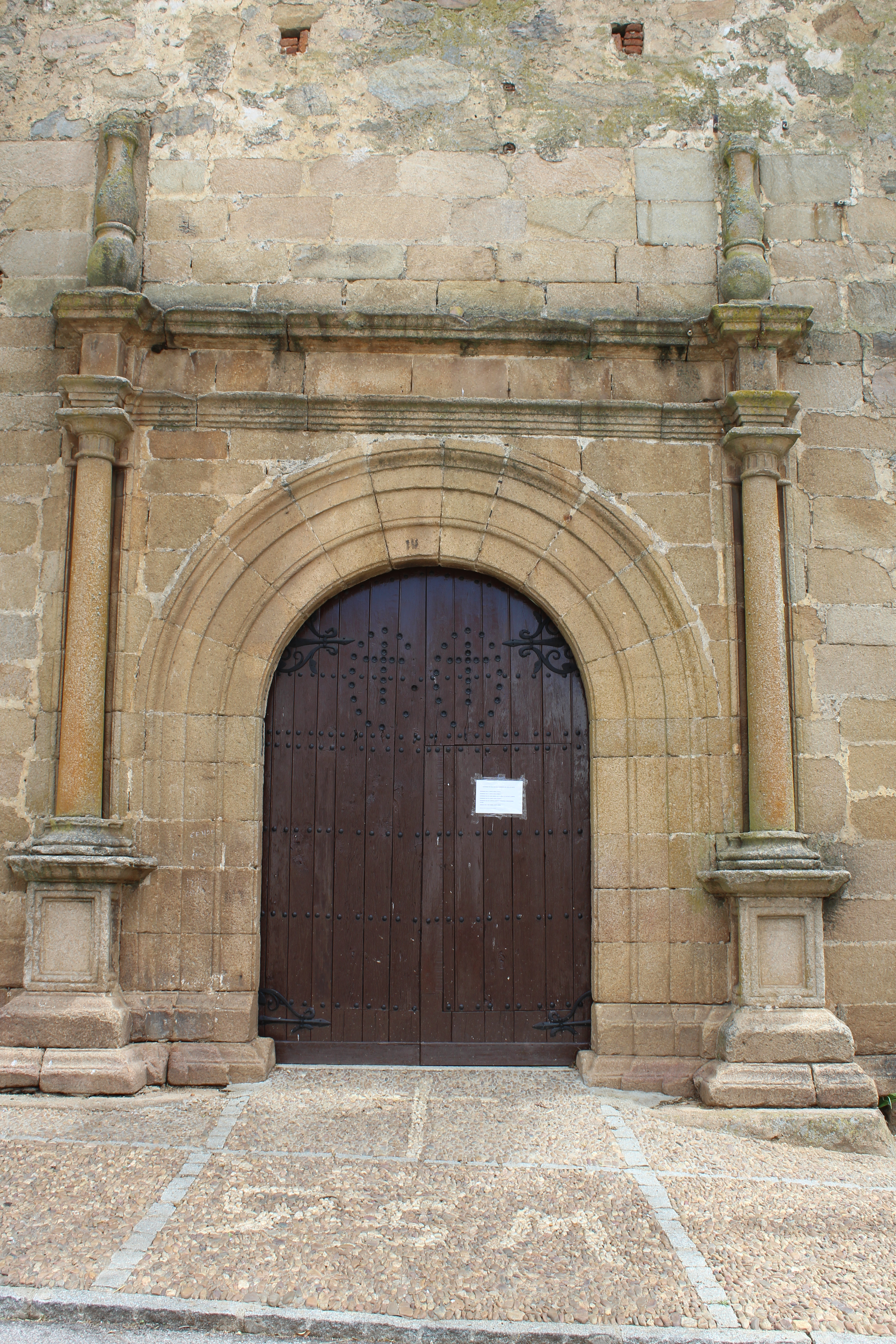 Pórtico de entrada a la iglesia parroquial de Santa Marina